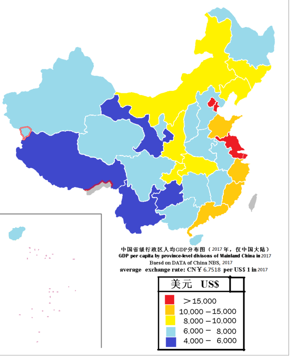 2017年中國大陸各省人均gpd分布